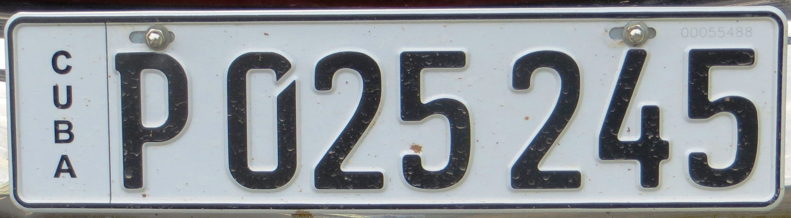 Kentekenplaat uit Cuba